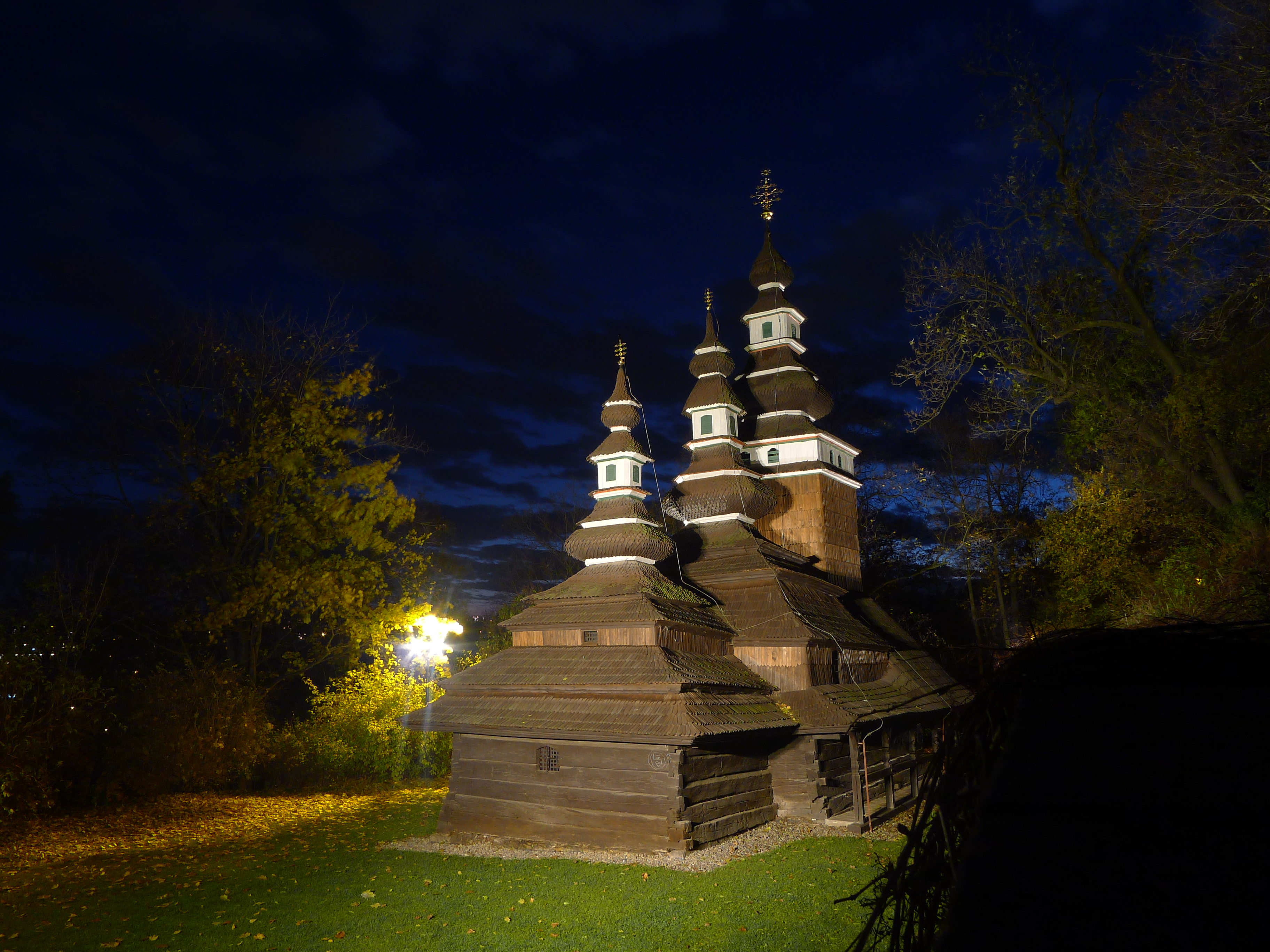 Česky: Pravoslavný kostel sv. Michala v Kinského zahradě